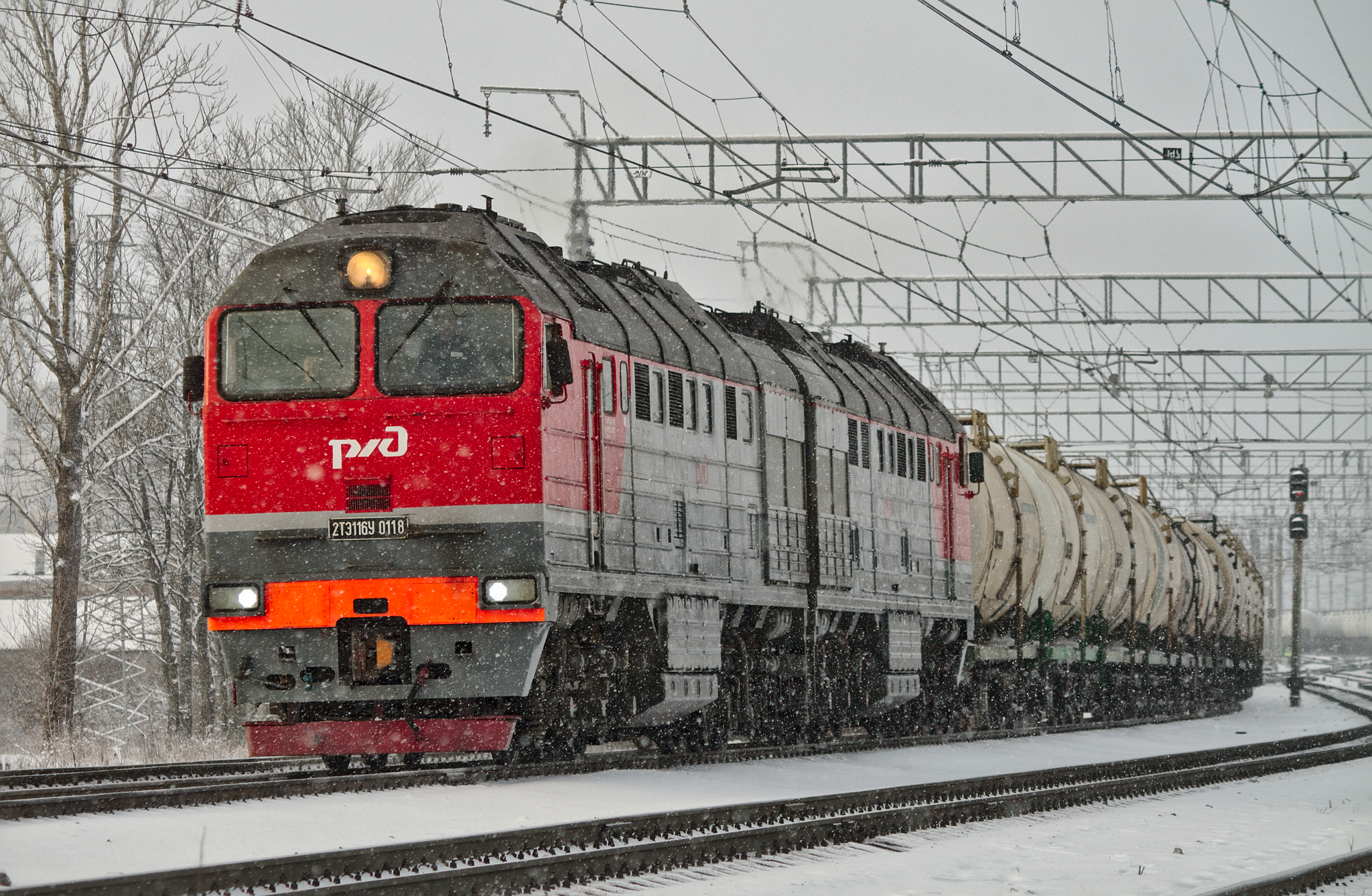 2ТЭ116У-0118, Гатчина-Западный парк. см. фото 575378 в альбоме автора